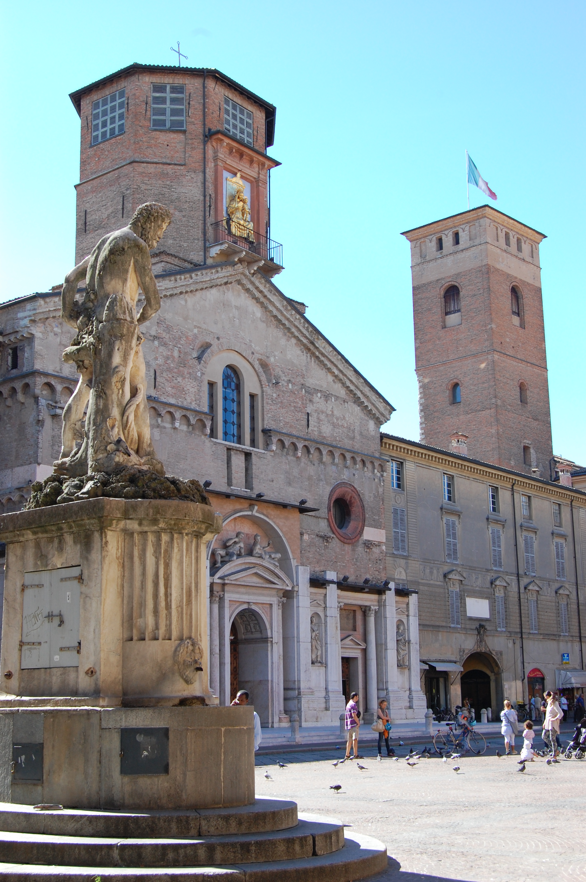 Piazza Prampolini